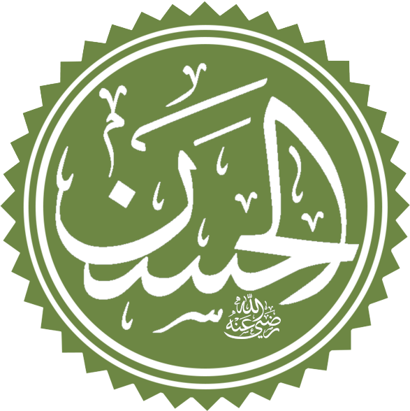 تخطيط اسم الحسن رضي الله عنه